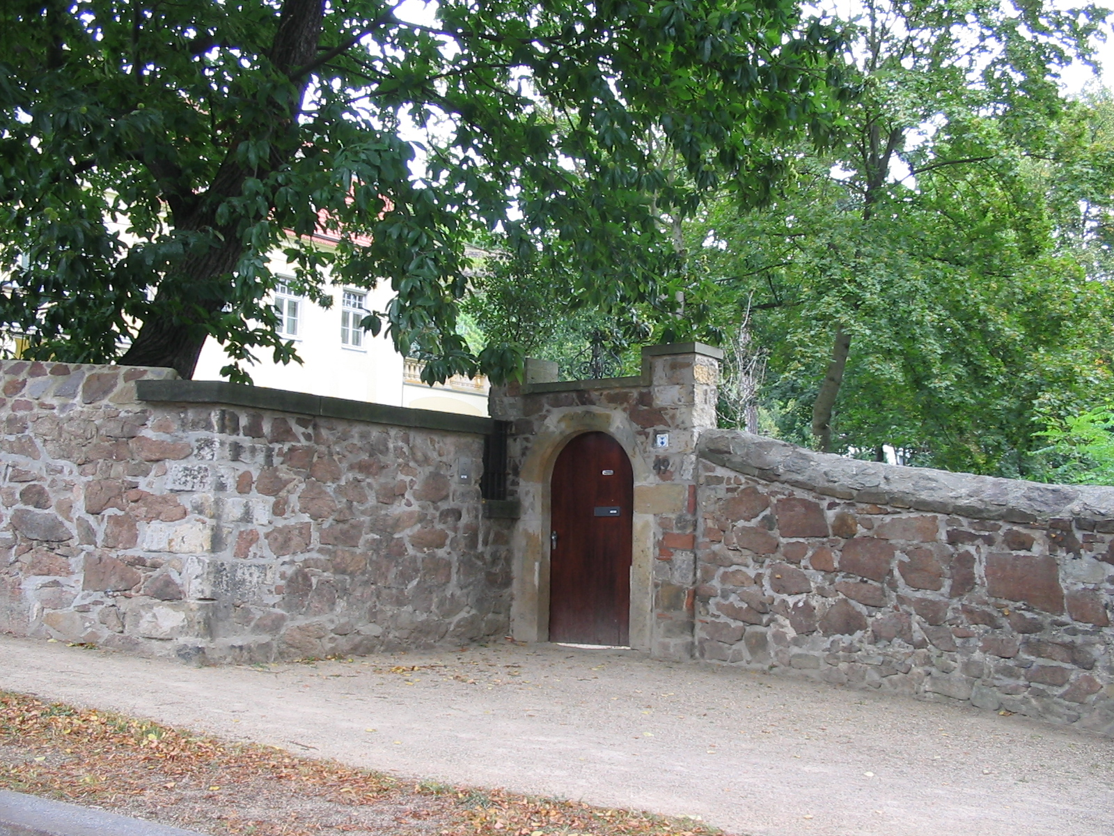 Radebeul Eingangspforte Haus Albertsberg